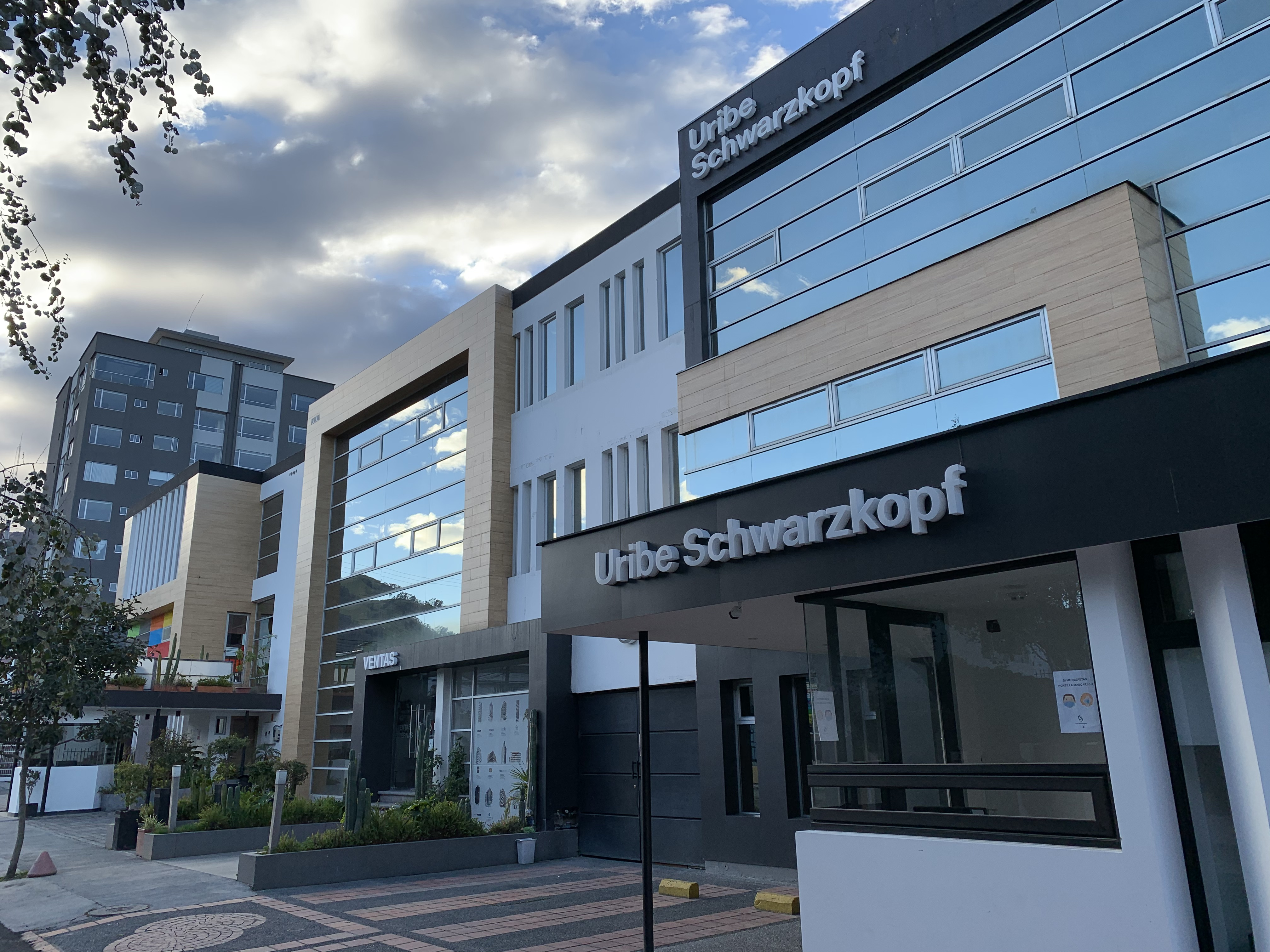 Sede de Uribe Schwarzkopf